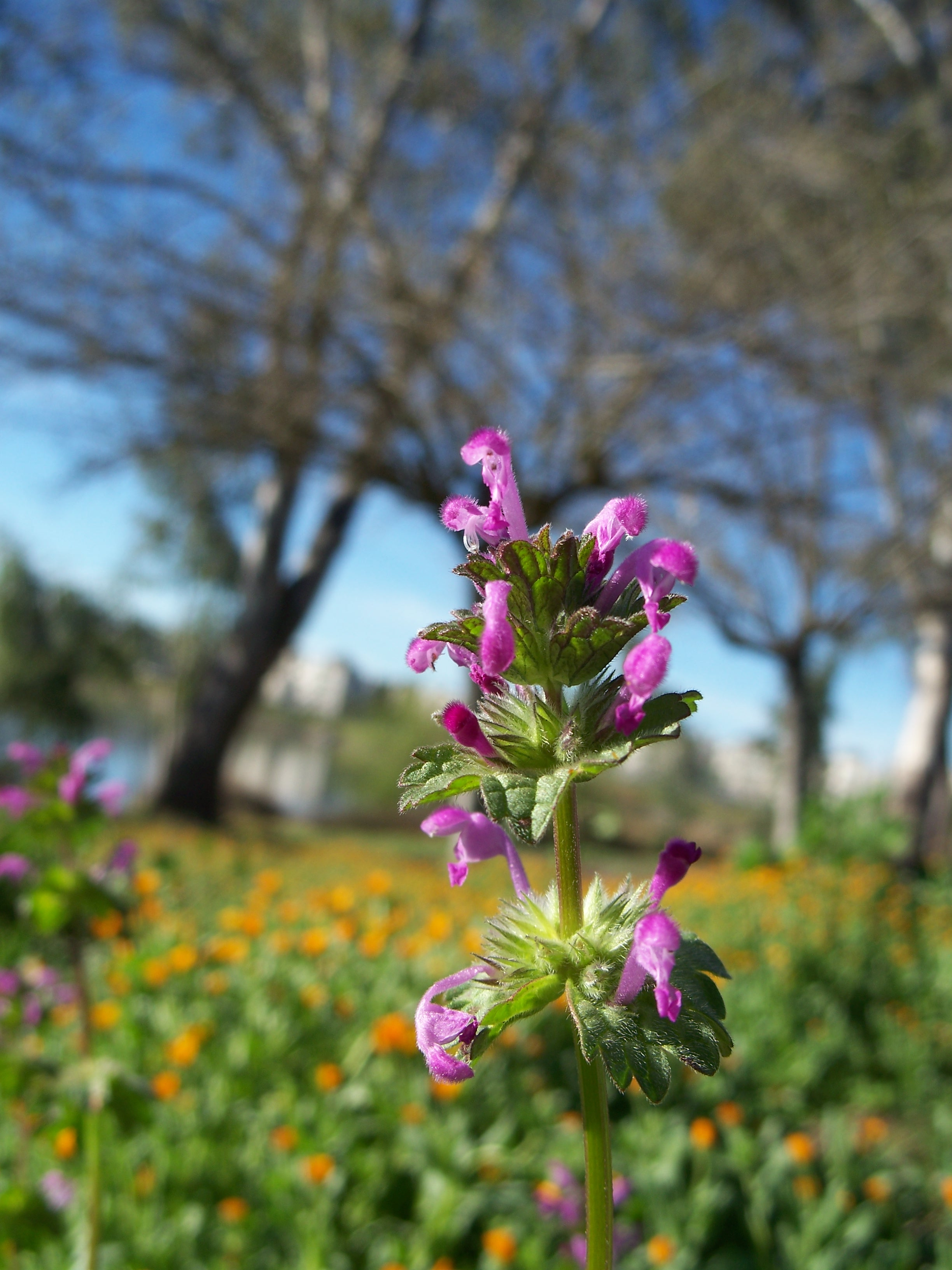 Lamium amplexicaule Made in San Jose, California, USA. Identified by Franz Xaver.